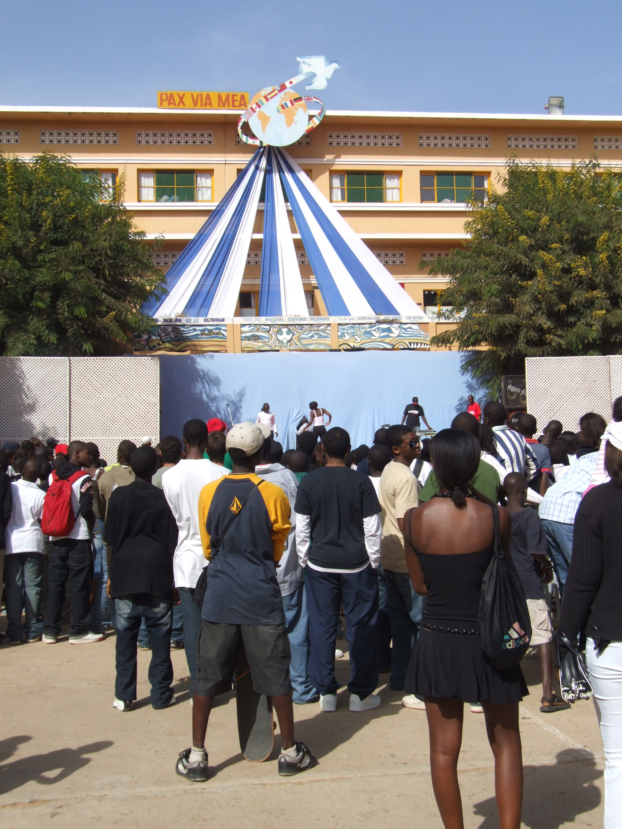 Fête de l'école au Cours Sainte-Marie de Hann (Dakar, Sénégal)